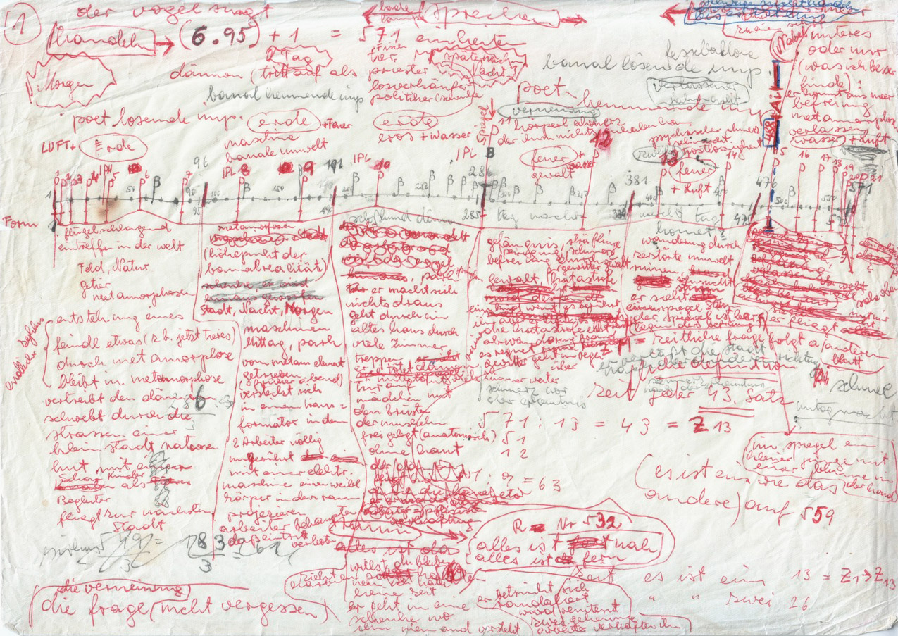 Konrad Bayer, "der vogel singt. eine dichtungsmaschine in 571 bestandteilen", 1957-58, Konstruktionsskizze, Zeichnung, Handschrift, roter Kugelschreiber und Bleistift auf Papier